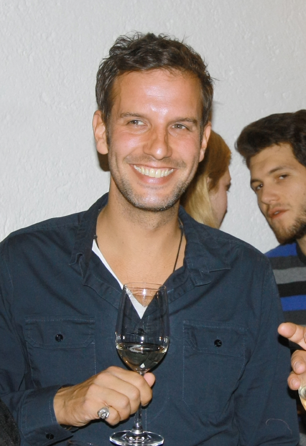 Florian Stadler, deutscher Schauspieler, u.a. Fitnesstrainer Nils Heinemann in der Serie "Sturm der Liebe"